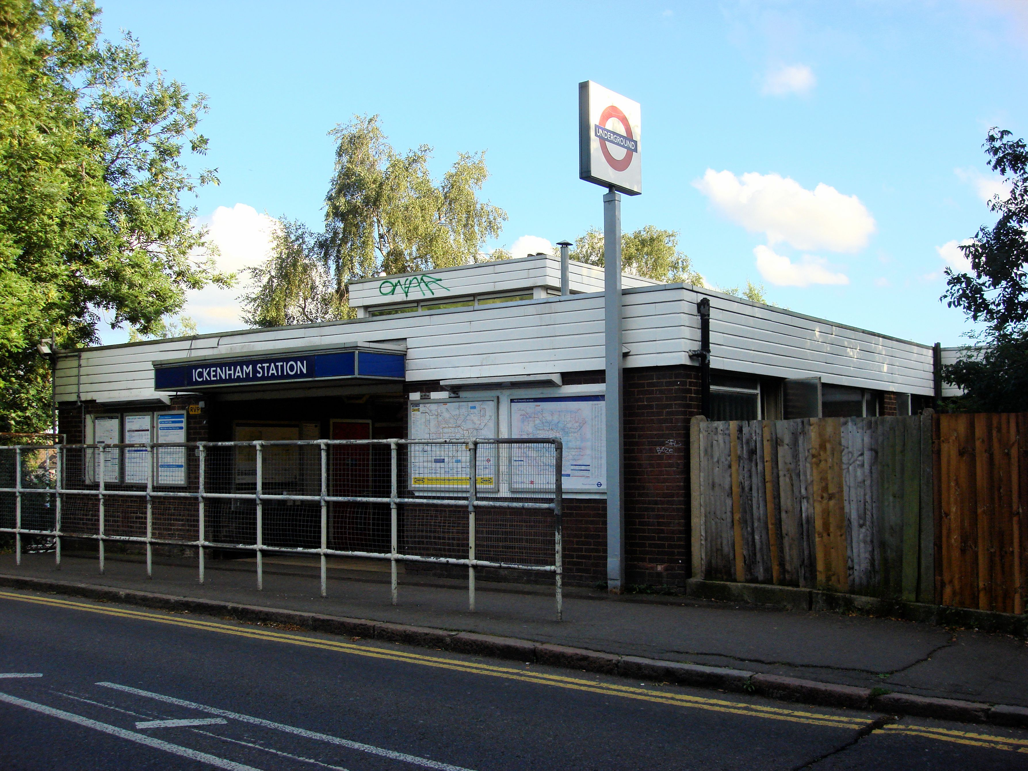 Ickenham tube station